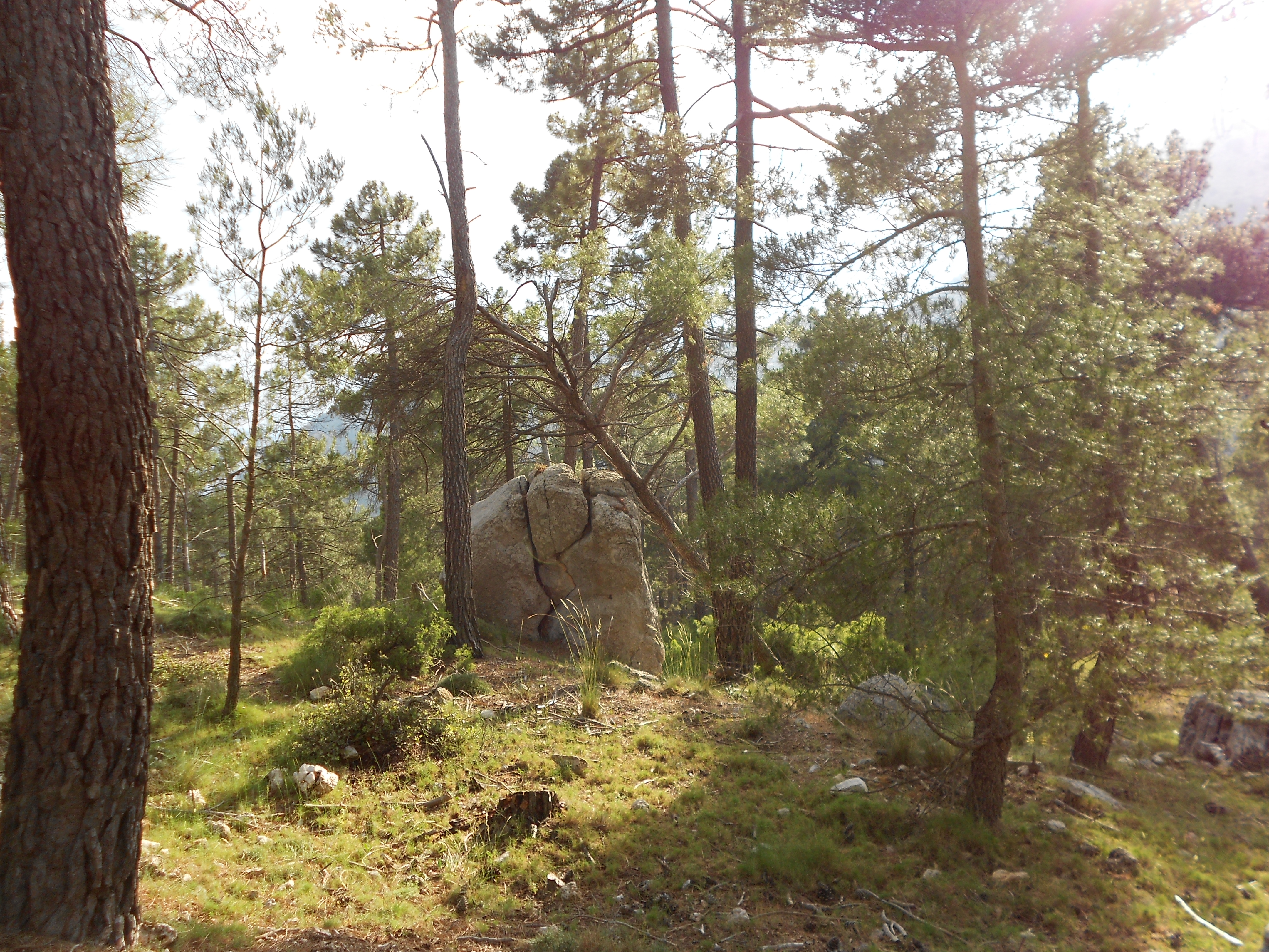 Sierra Espuña This is a photography of a Special Area of Conservation in Spain with the ID: ES0000173. Natura2000 entry, EEA entry